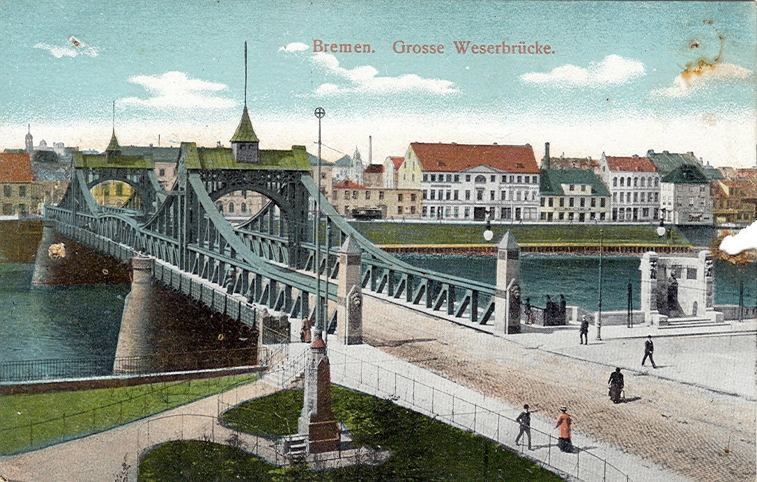 Bremen, Große Weserbrücke (erbaut 1895), Blick von Osten, rechts am Ufer das Franzius-Denkmal (erbaut 1908)